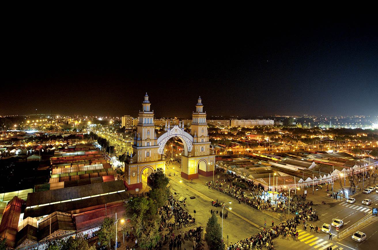 Vista genérica de la feria de abril de 2013 (Sevilla)